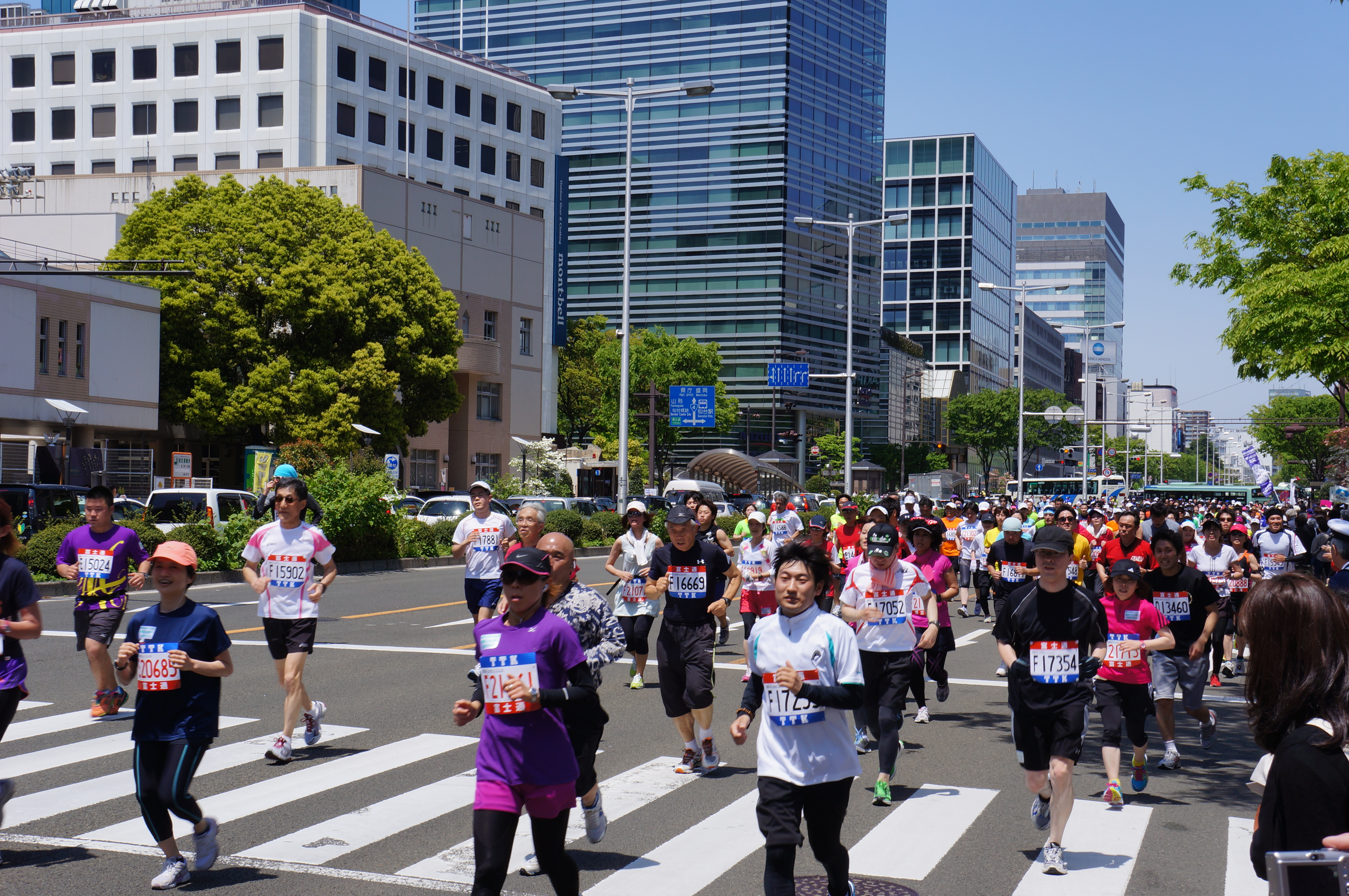 2012年大会の様子。